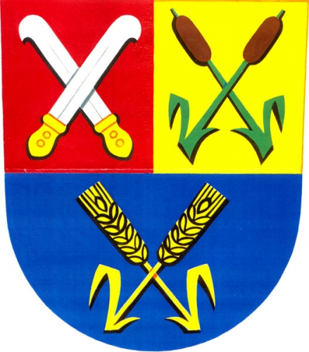 Znak obce Osek nad Bečvou